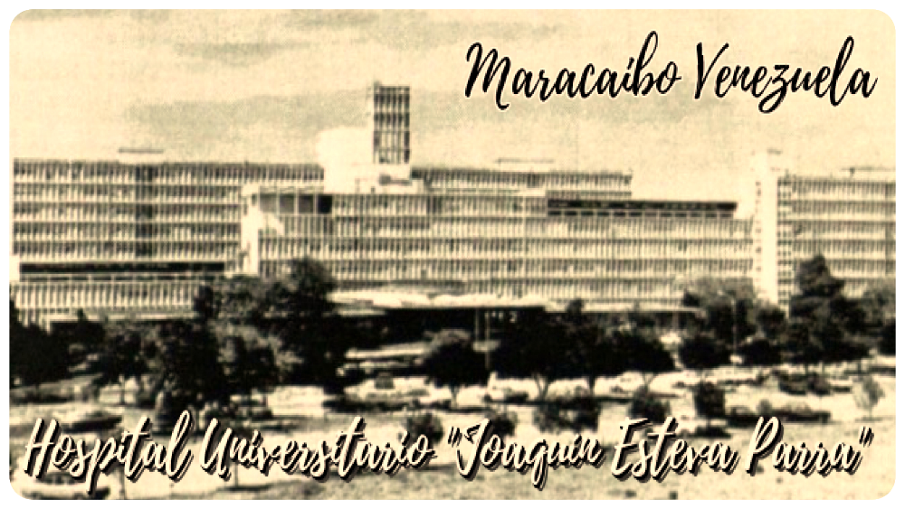 Tarjeta postal sobre Maracaibo, Venezuela. Imagen: Hospital Universitario "Joaquín Esteva Parra", recién construido.